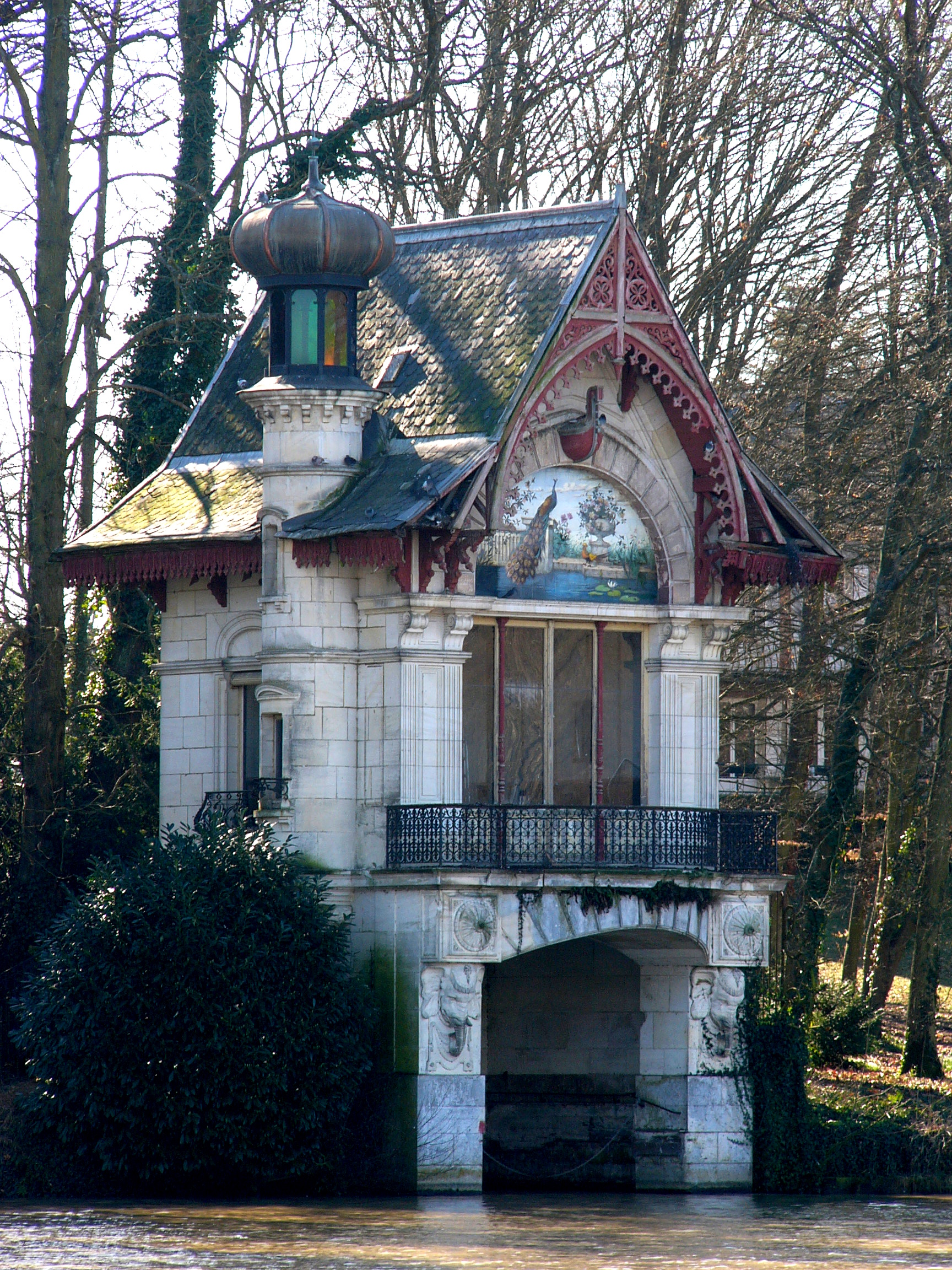 Garage à bateaux de la Quétonnière sur le Loiret, Olivet, Loiret, France